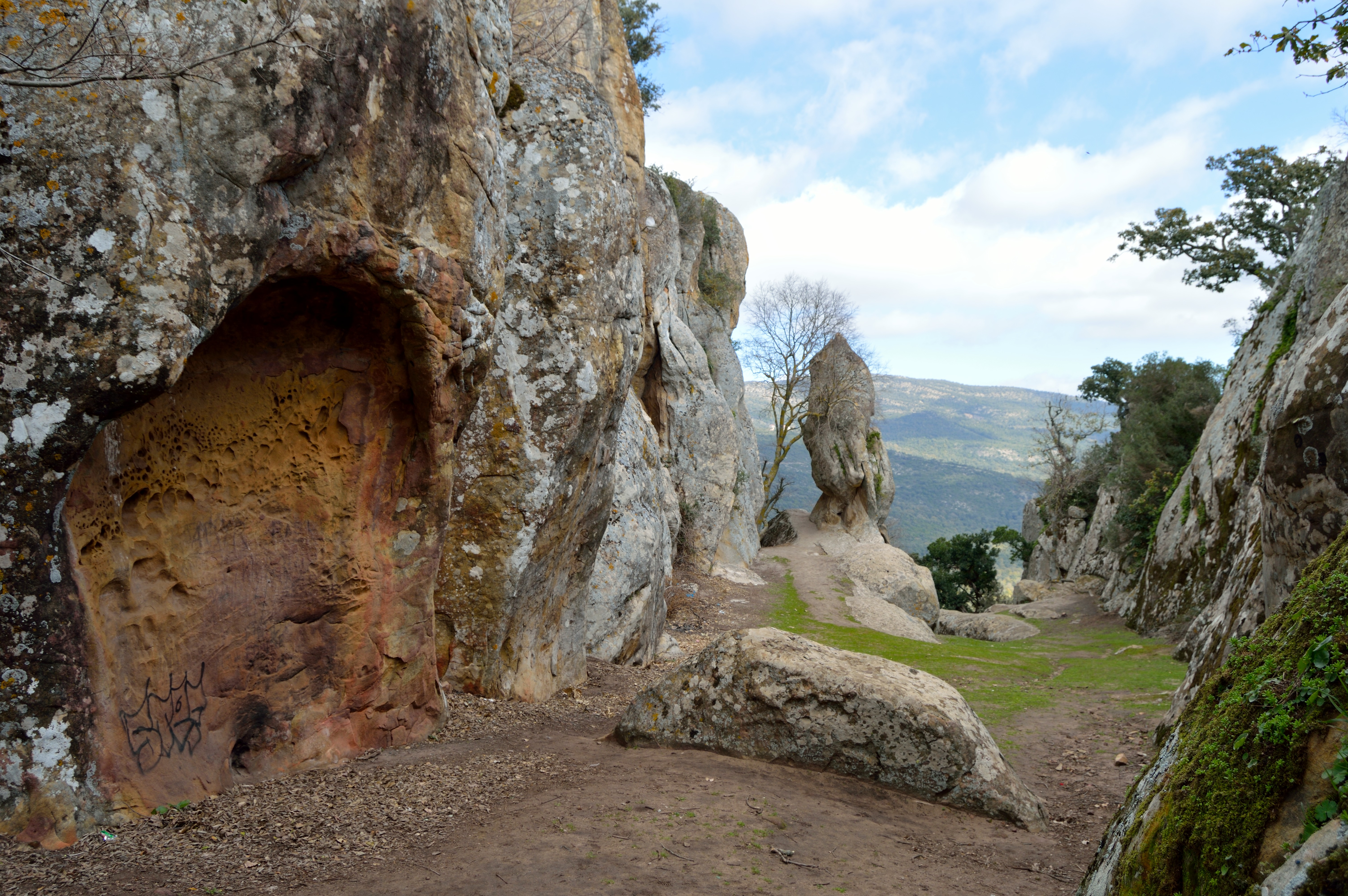 feija